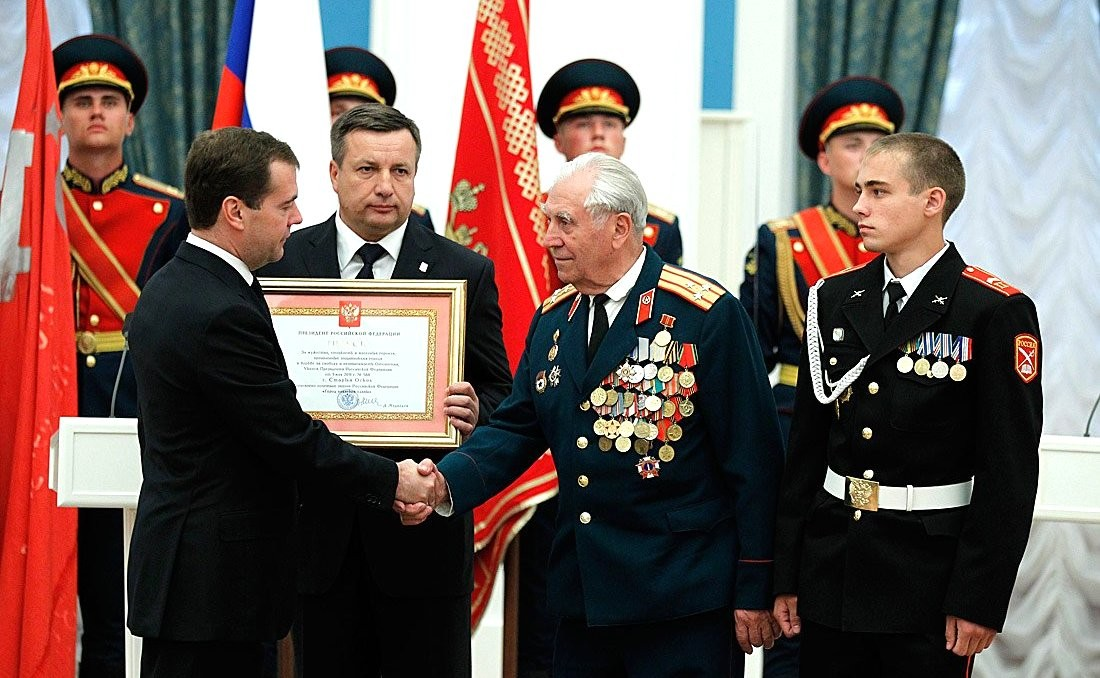 На вручении грамоты «Город воинской славы» в Кремле главе г. Старый Оскол Павлу Шишкину